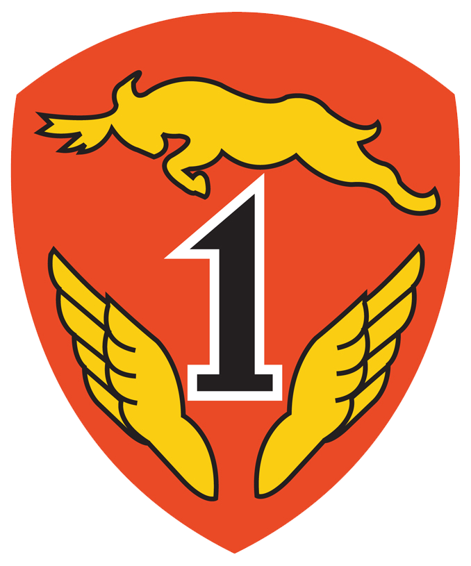 Gambar ini adalah Lambang Skuadron Udara 1, Koops AU I